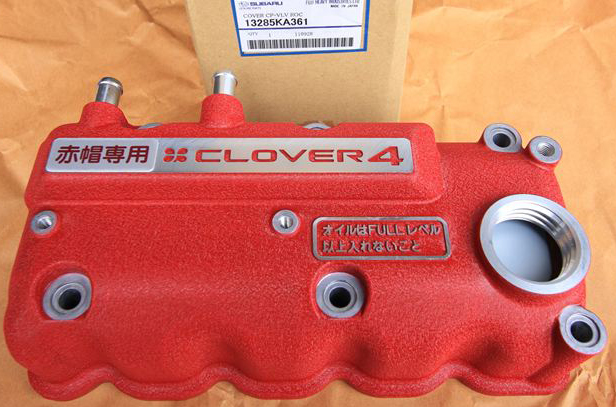 スバルサンバー赤帽仕様車の、EN07Yエンジン用ロッカ－カバー。 赤色の縮み塗装が施され、赤帽専用の銘板が取り付けられている。